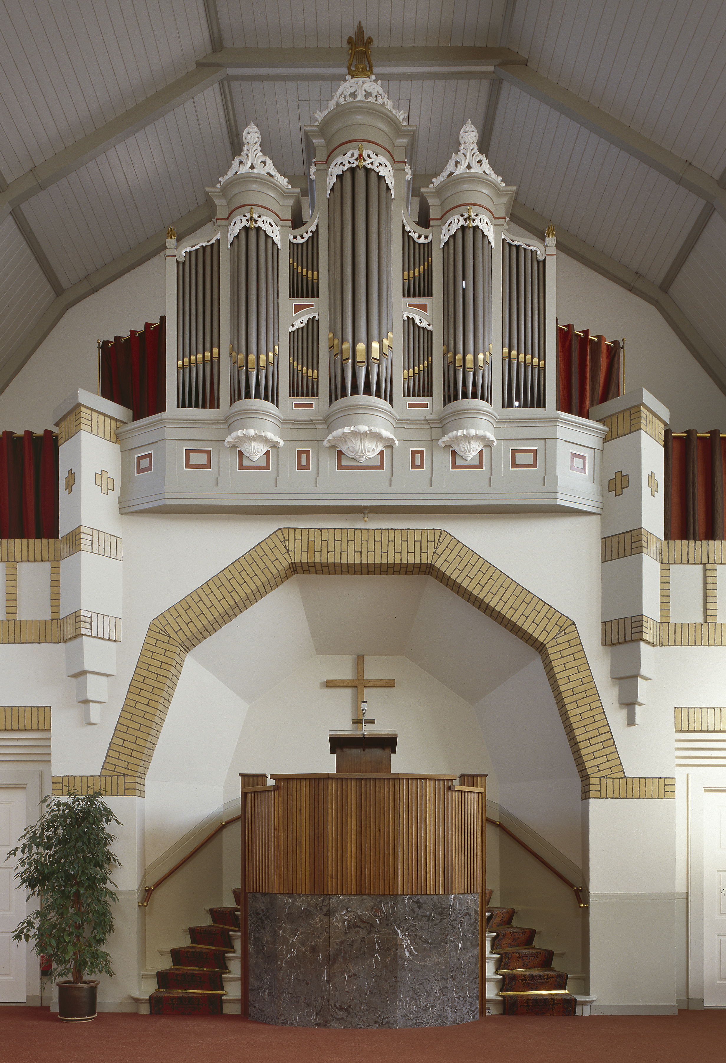 Gereformeerde Kerk: Interieur, aanzicht orgel, orgelnummer 144 (opmerking: Gefotografeerd voor Het Historische Orgel in Nederland 1894-1901, bladzijde 327)